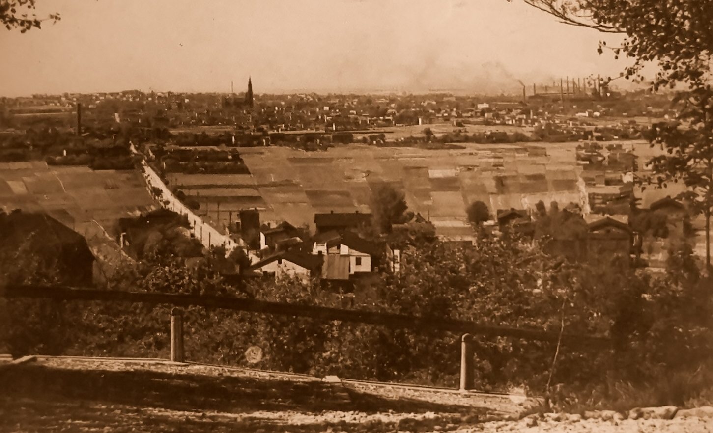 Dombrowa czyli Dąbrowa Górnicza w okr. II wojny światowej. Widok z Góry Gołonoskiej